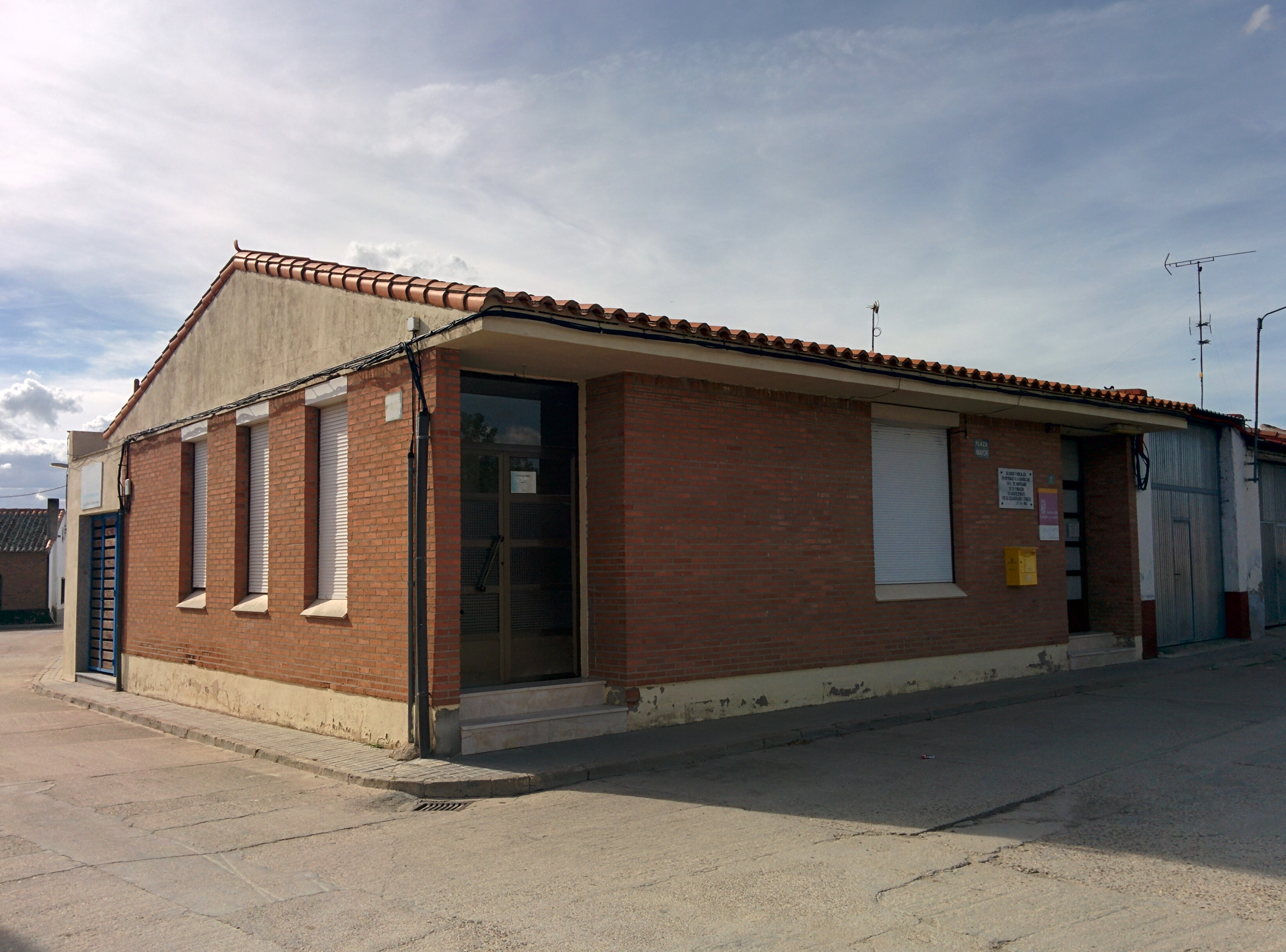 Casa consistorial de Salvador de Zapardiel (Valladolid, España).